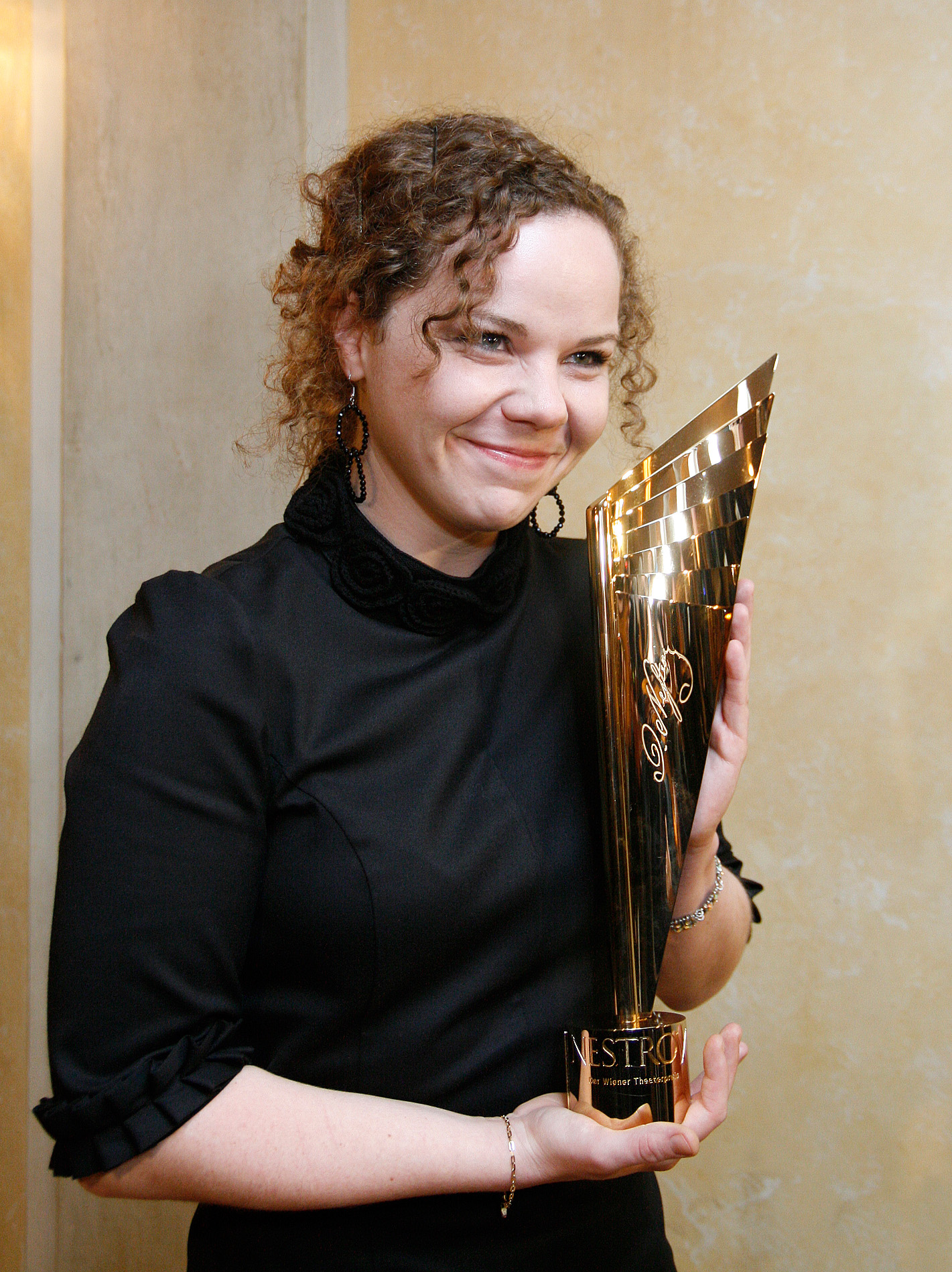 Sarah Viktoria Frick, ausgezeichnet als beste Nachwuchsschauspielerin, bei der Verleihung des Nestroy-Theaterpreises 2010 im Burgtheater in Wien.